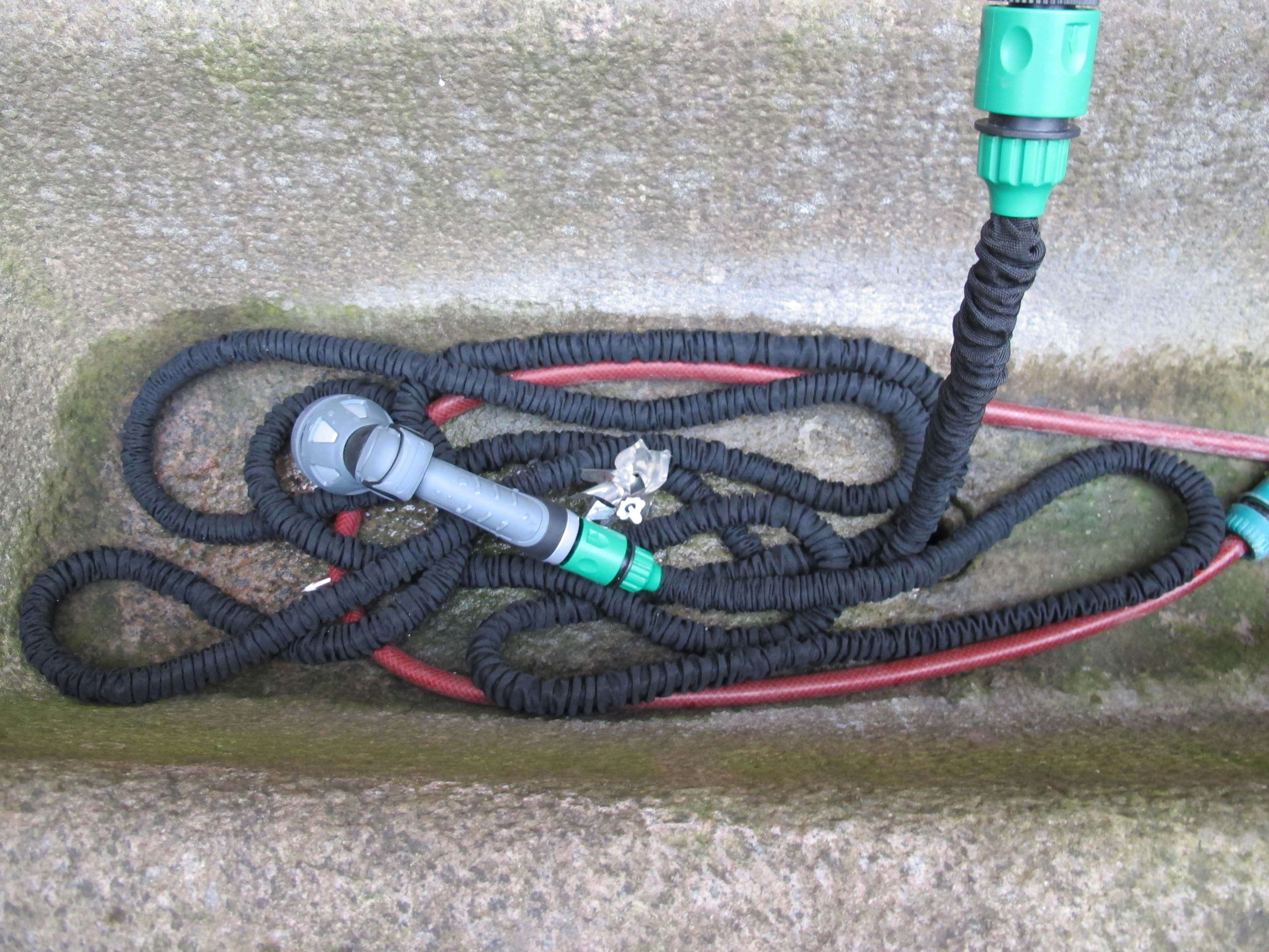 Elastikvandslange